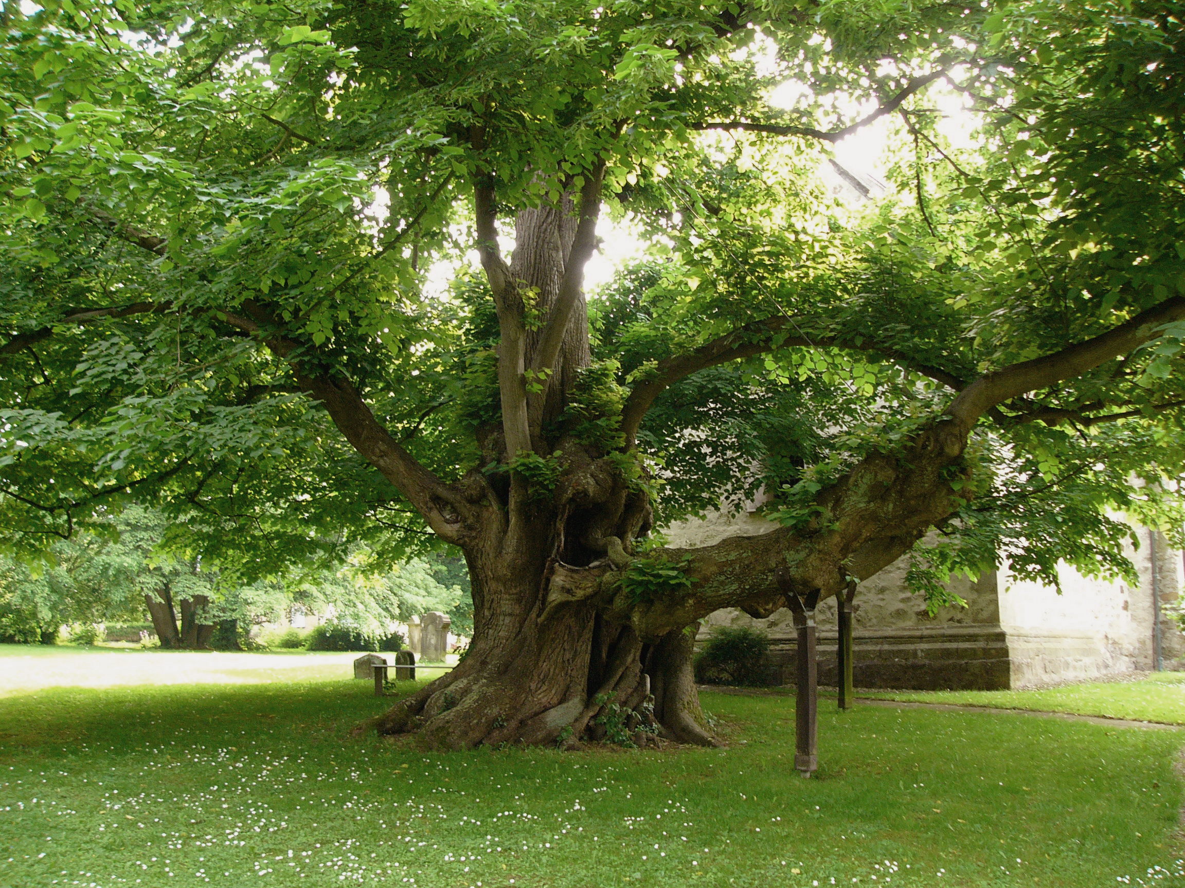 1000-jährige Linde („Kirchlinde“) in Reelkirchen, Ortsteil von Blomberg, Germany